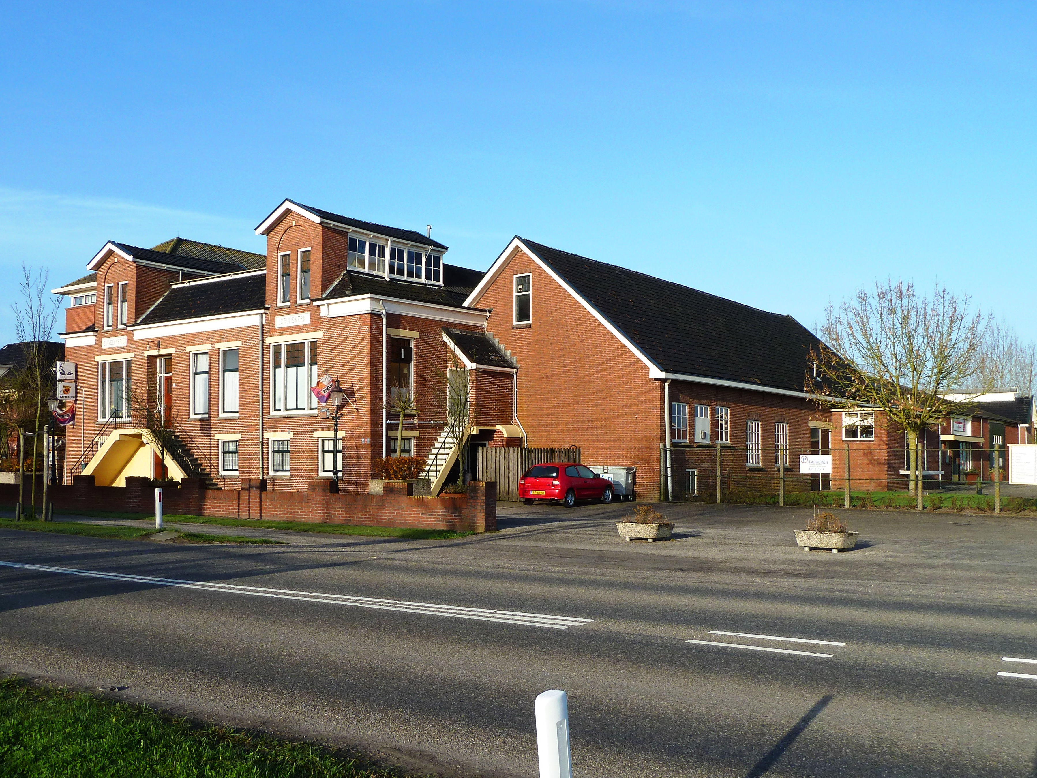 Zuivelfabriek de Kievit aan de Kievitsweg 26 in Grijpskerk (Zuidhorn, Groningen, Nederland).